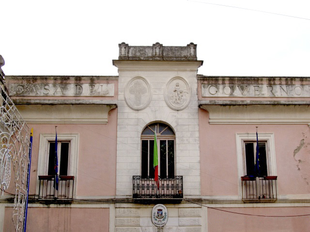 Facciata dell'ex Convento di San Francesco, oggi sede del comune diMontesarchio (BN), Italia